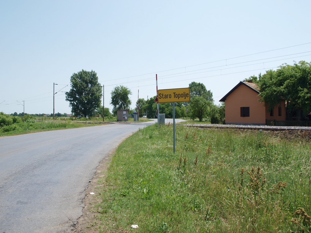 Ulaz u selo Staro Topolje, Brodsko-posavska županija.